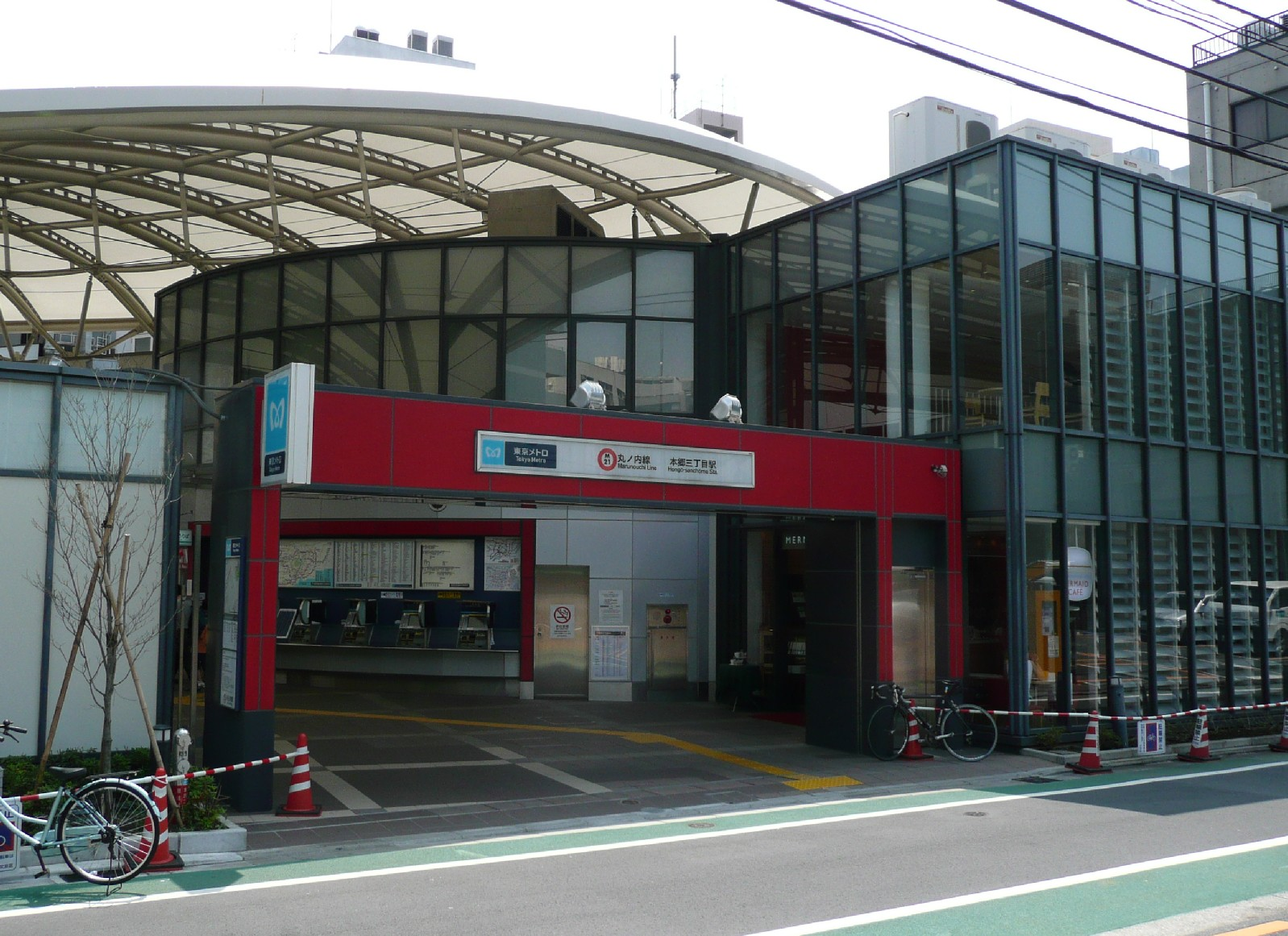 丸ノ内線本郷三丁目駅1番出入口